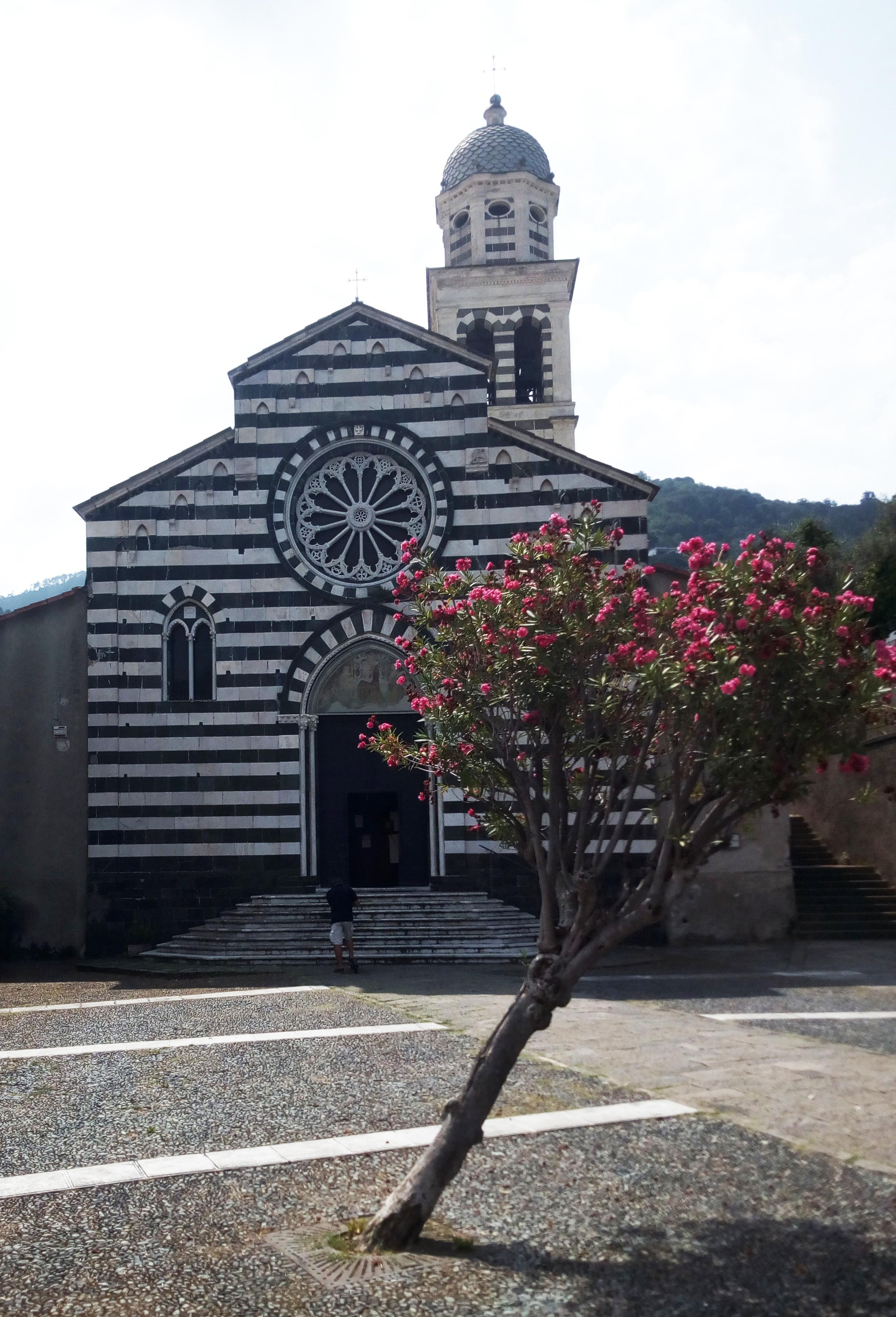 Église Sant'Andrea à Levanto (Italie)